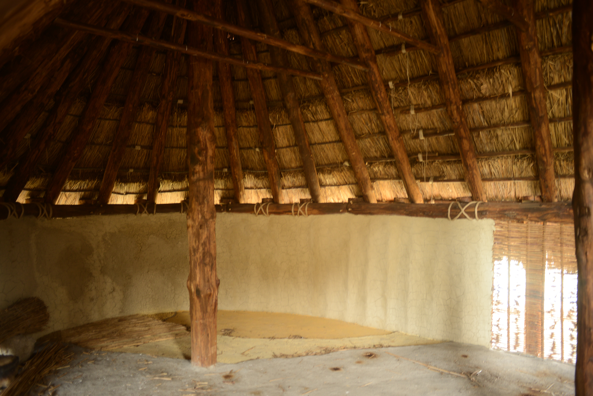 Parco archeologico del sito archeo-fluviale di Longola. Interno delle capanne del villaggio preistorico.